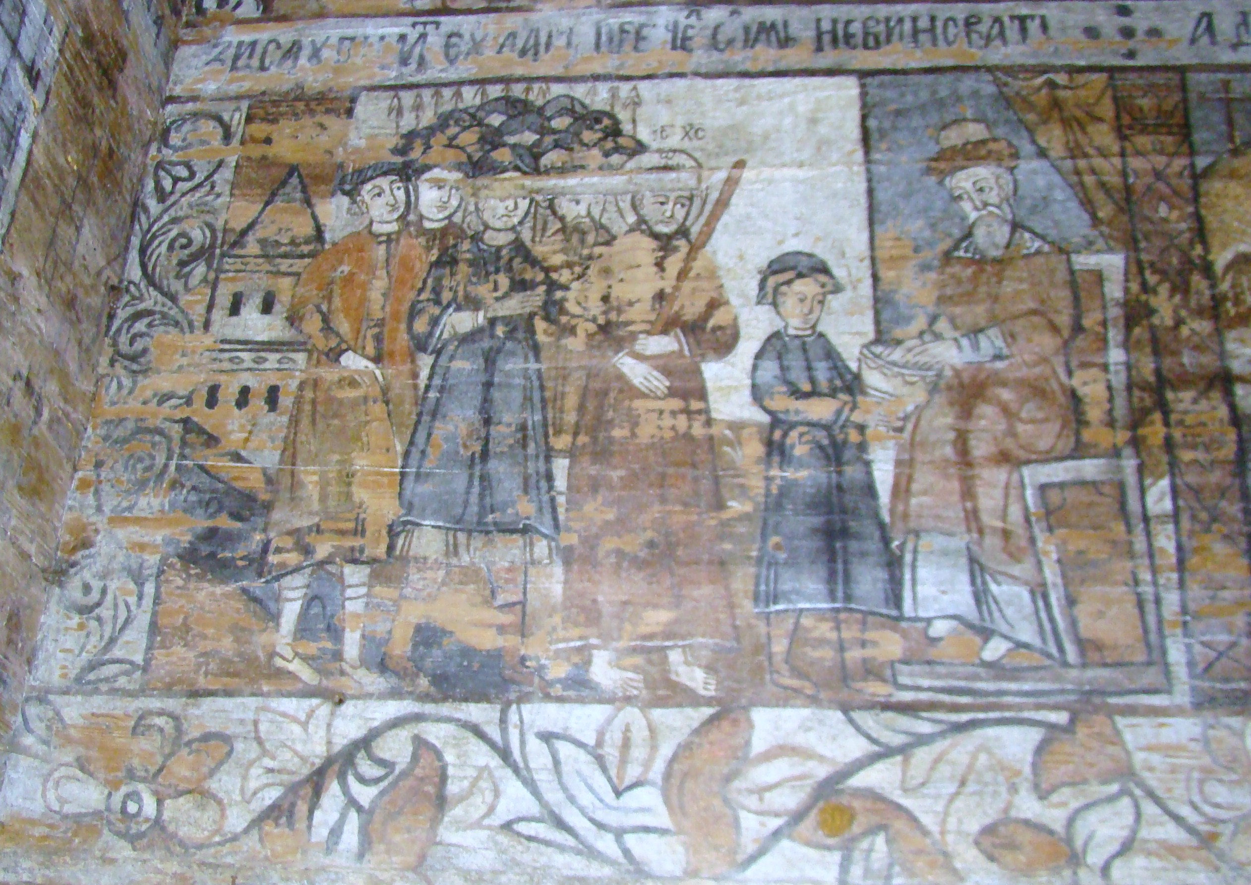 Biserica de lemn "Naşterea Maicii Domnului", sat IEUD